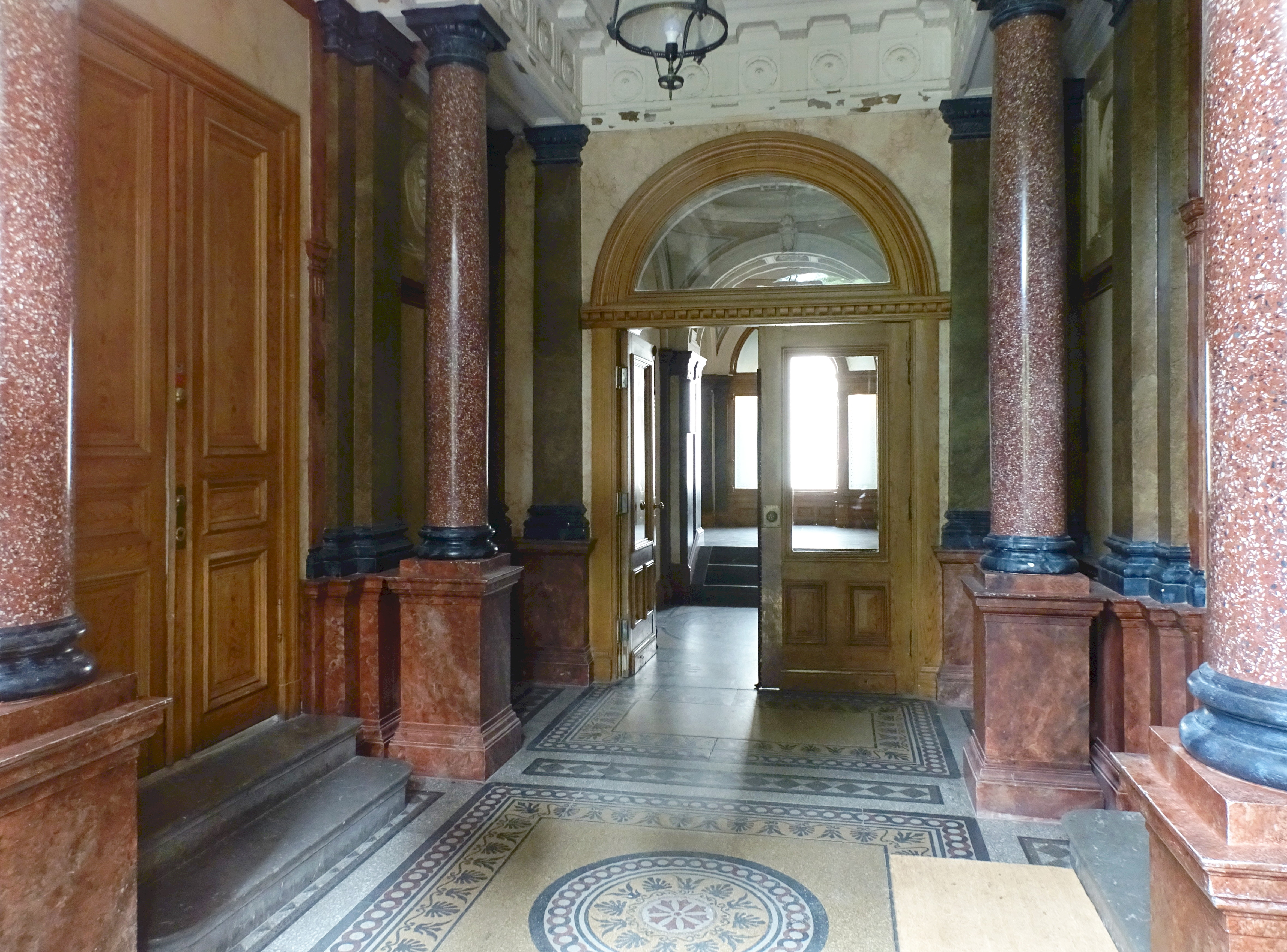 Kammakargatan 12 (fastigheten Hägerberget 56), S:t Johannes församlings tidigare församlingshus. Byggnadsår 1884-86, arkitekt Gustaf Sjöberg, byggherre Carl Jehander, byggmästare G Sjöberg.